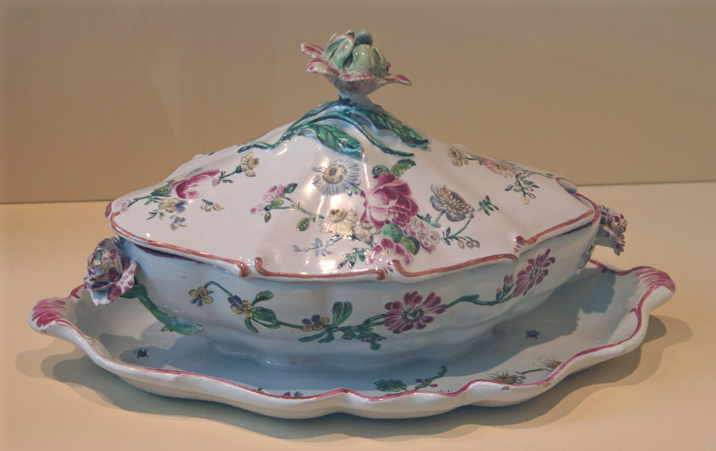 Musée de la faïence à Marseille, saucière des ateliers de la veuve Perrin à Marseille, 1760/1780, décor petit feu polychrome.